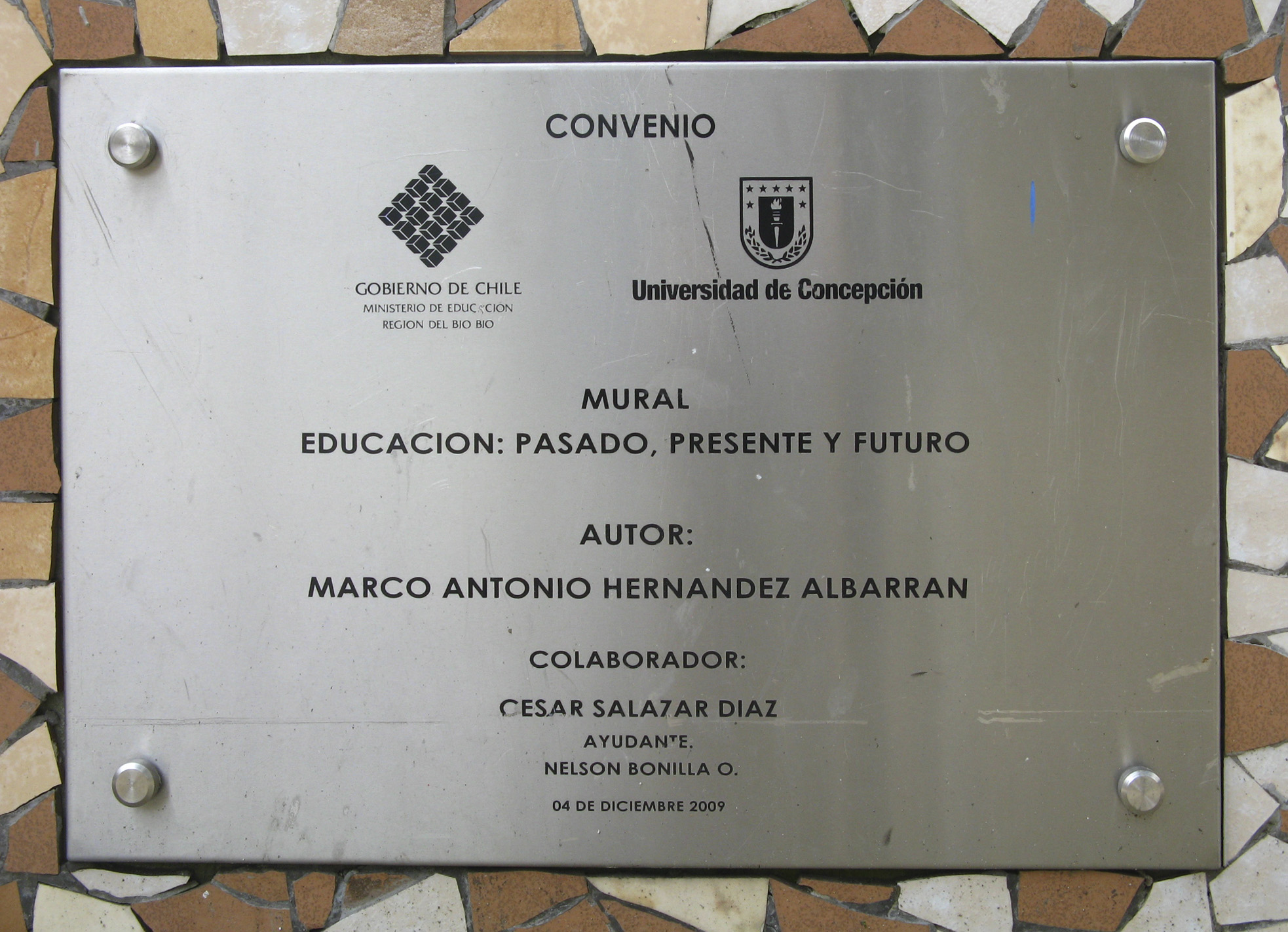 Placa del mural "Educación: pasado, presente y futuro" (2009) de Marco Antonio Hernández Albarrán. Concepción, Chile. Agosto de 2012.